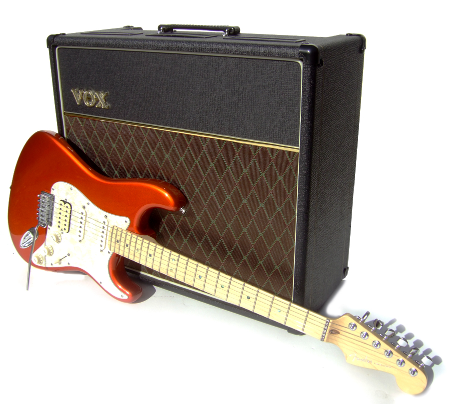 Fender American Deluxe Strat & Vox AC30